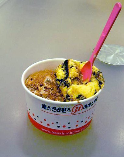 Baskin_Robbins ijsje. Koreaanse verpakking.